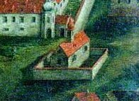 Kartuziánský klášter v Králově Poli u Brna, vpravo dole kostel svatého Víta